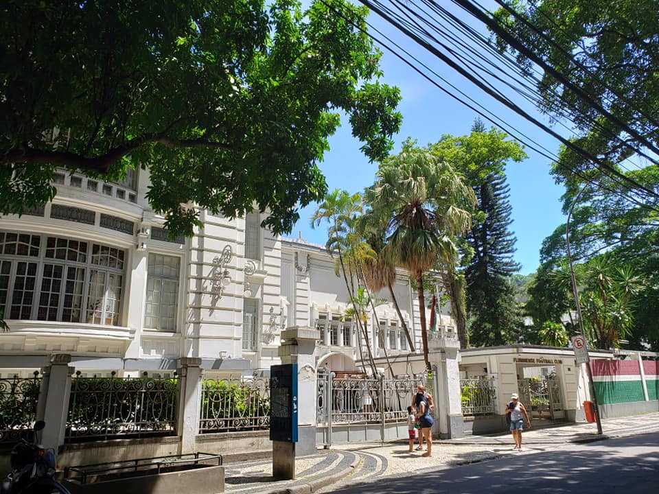 Visão externa da Sede do Fluminense Football Club.